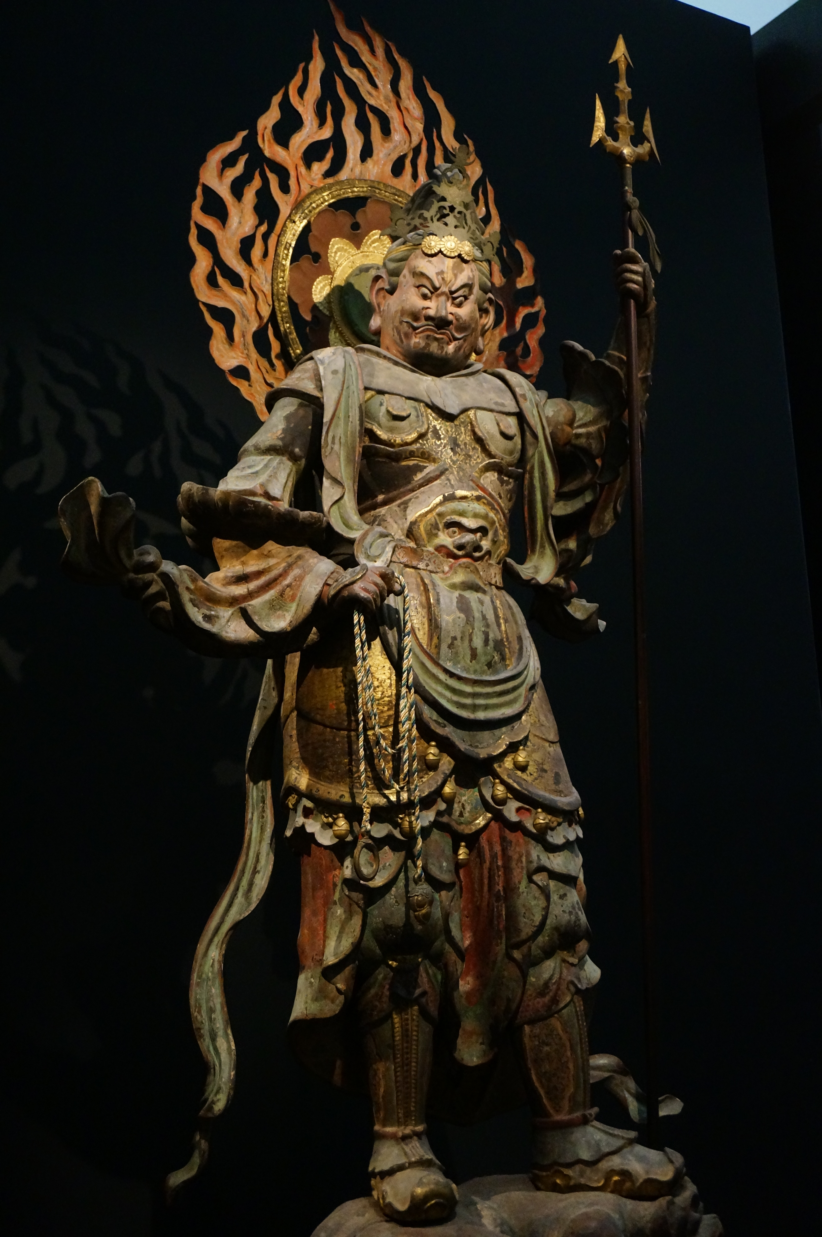 広目天、平安時代、浄瑠璃寺蔵、東京国立博物館に寄託中。